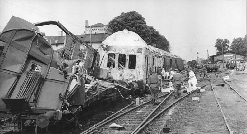 Zentralbild Koard 6.7.1967 Folgenschweres Verkehrsunglück im Bezirk Magdeburg Ein folgenschweres Verkehrsunglück ereignete sich am Morgen des 6.7.1967 in unmittelbarer Nähe des Bahnhofs Langenweddingen, Kreis Wanzleben, Bezirk Magdeburg. An dem dort befindlichen beschrankten Bahnübergang stieß der aus Richtung Magdeburg kommende Personenzug 852 mit einem Tankfahrzeug des VEB-Minol zusammen, wobei die Benzinladung explodierte. Unser Bild zeigt einen Blick auf die Unglücksstelle.